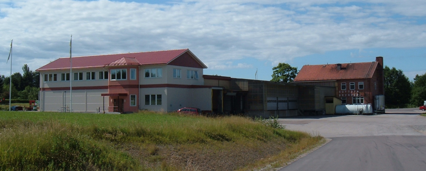 Guttsta Bryggeri